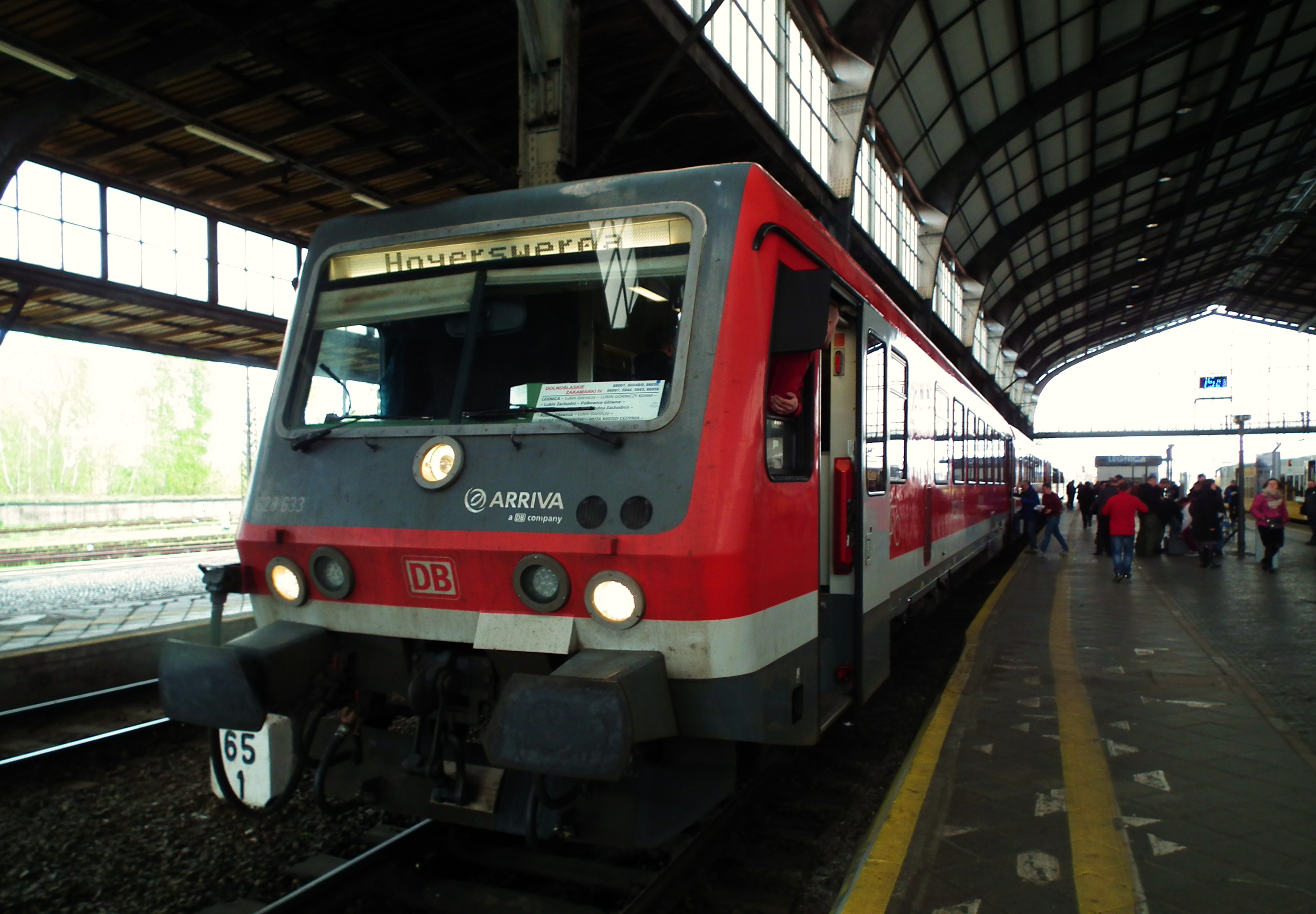 Skład z Wrocławia do Horki i Hoyerswerdy.